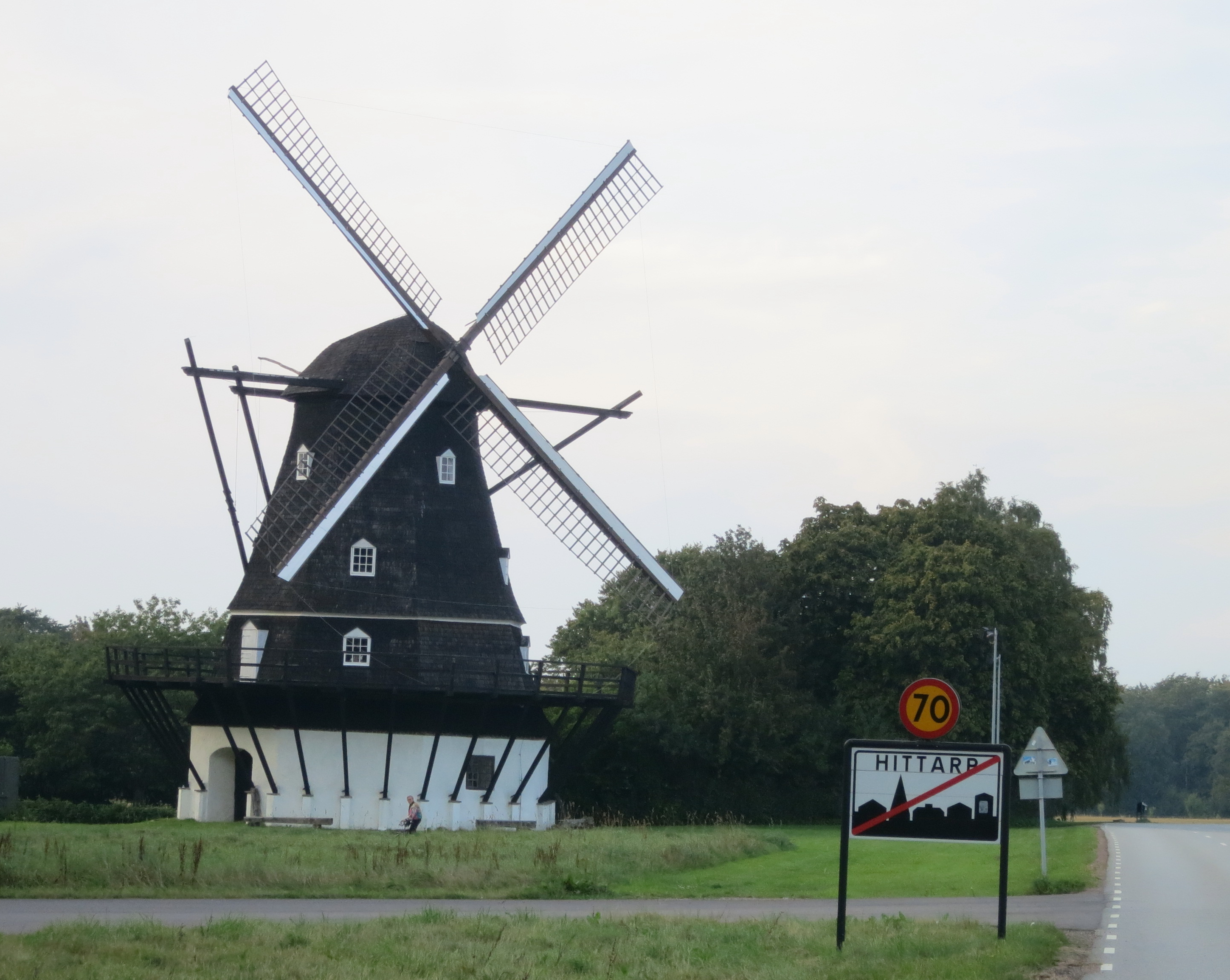 Kulla Gunnarstorps mölla (Kulla Gunnarstorp 1:21)